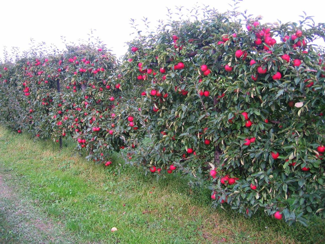 Szpaler jabłoni - odmiana Idared